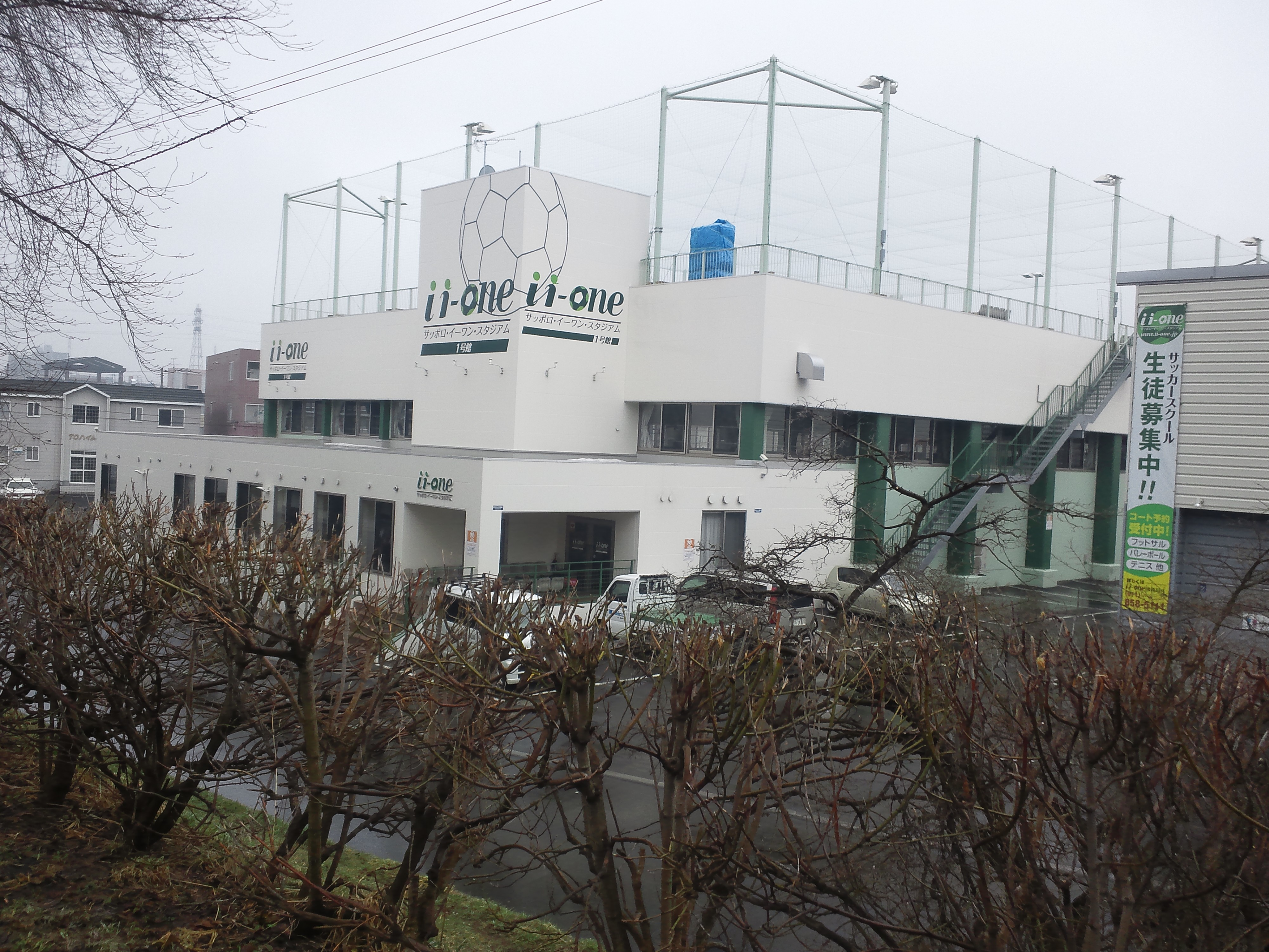 札幌市白石区に所在するフットサル専用室内グラウンド（2012/04撮影）